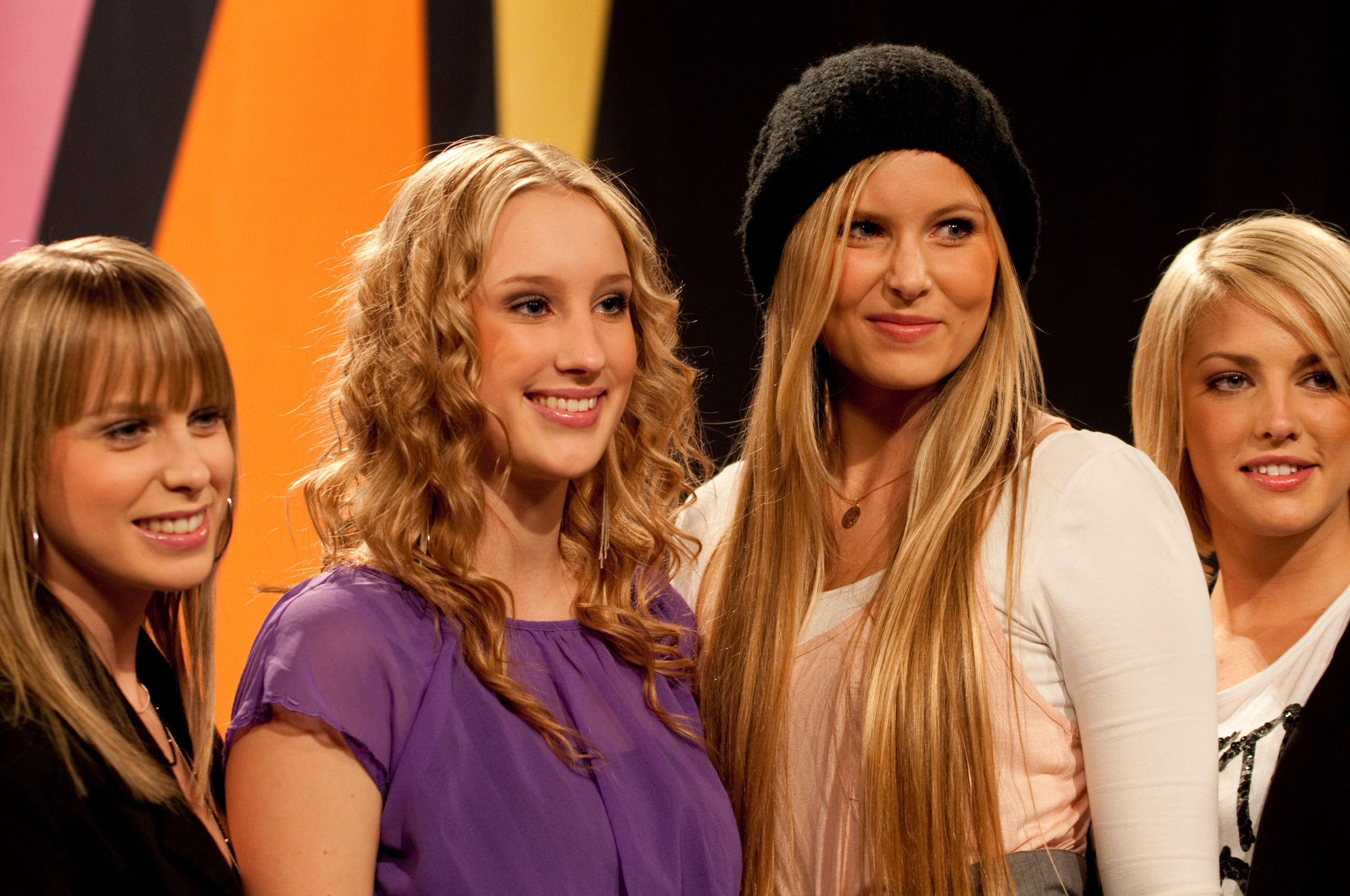 Timoteij 2009 at a press conference for Melodifestivalen 2010